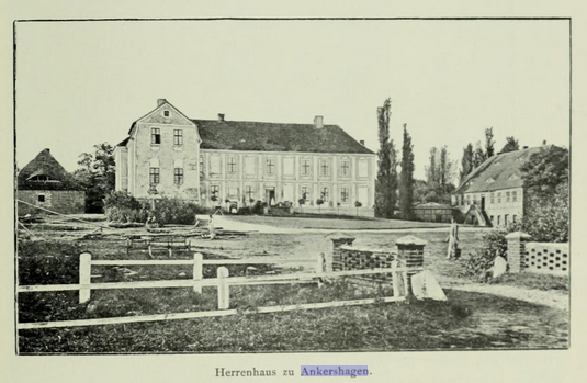 Ansicht Herrenhaus Ankershagen